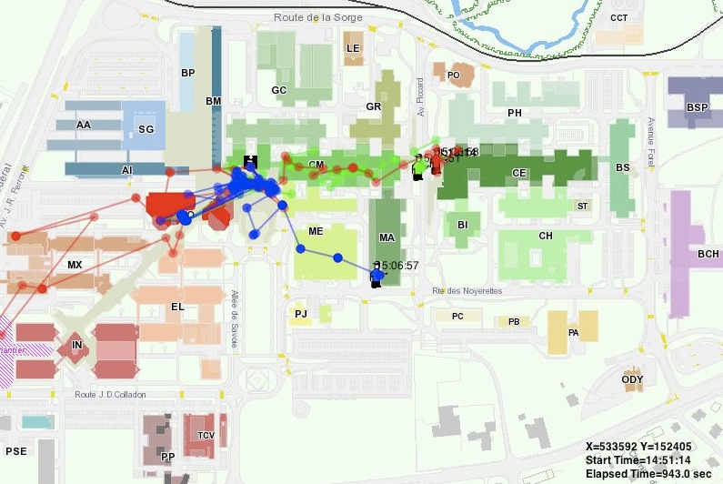 catchbob, 2004!